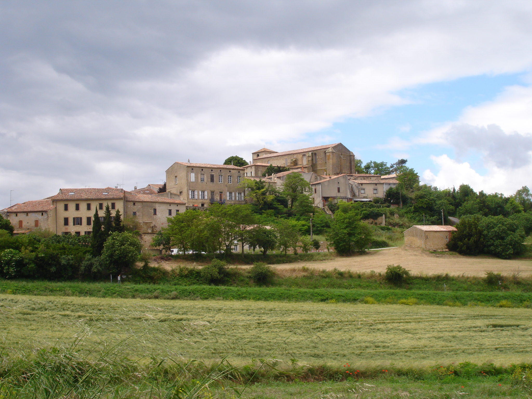 France, Aude (11), Laurac, vue générale du village sur son promontoire